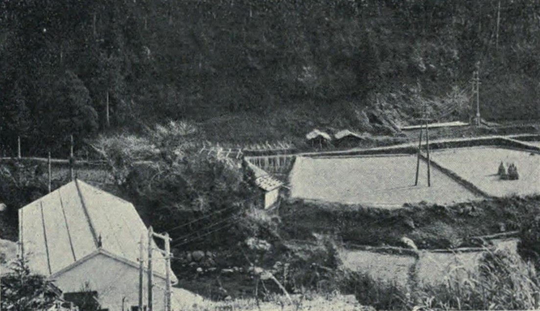 豊橋電灯の発電所